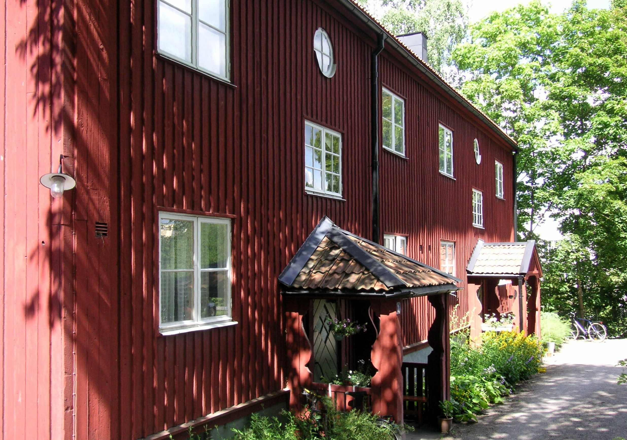 Cedersdalsgatans hus i Vanadislunden i Stockholm